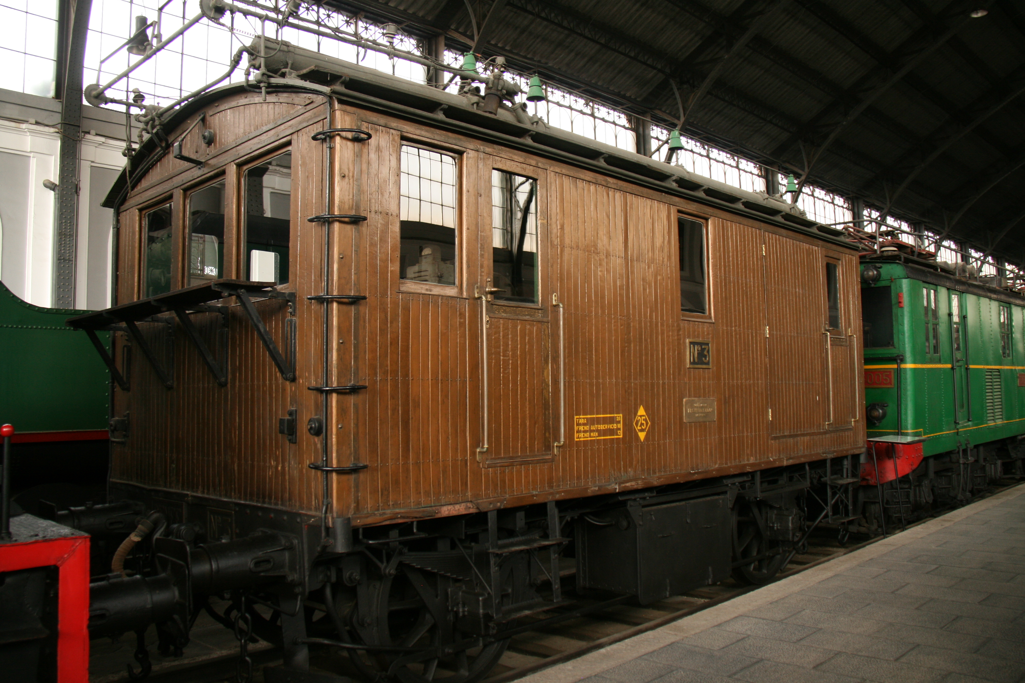 Locomotora eléctrica 3 (andaluces)